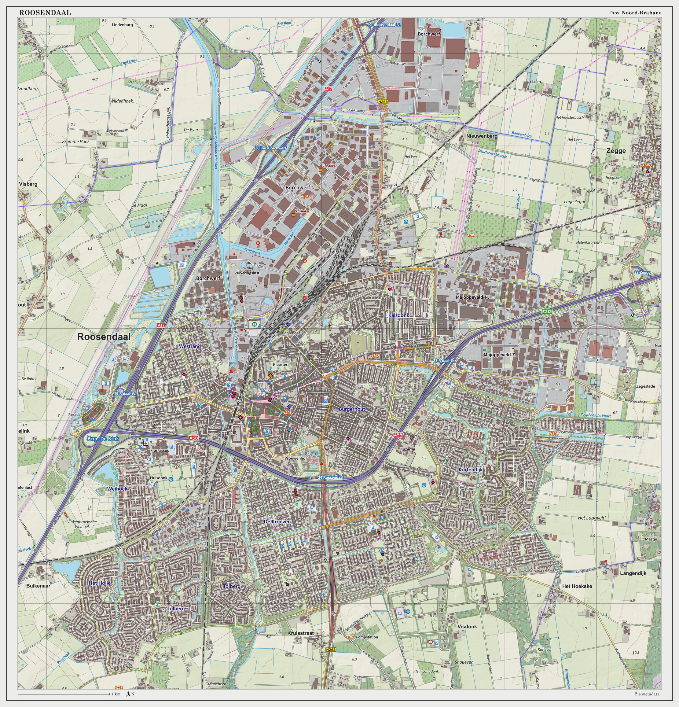 Topografische kaart van Roosendaal (woonplaats). Resolutie: 300 pixels/km. Kaartbeeld samengesteld uit de open geodata van de Top10NL en Top25namen (Basisregistratie Topografie, Kadaster), Creative Commons BY licentie. Gebouwvlakken uit open geodata BAG extract. Wegen uit de OpenStreetMap. Reliëfschaduw uit de Actuele Hoogtekaart AHN2. Samenstelling en kleurenschema: Jan-Willem van Aalst, met QGIS2. Zie ook de Legenda.